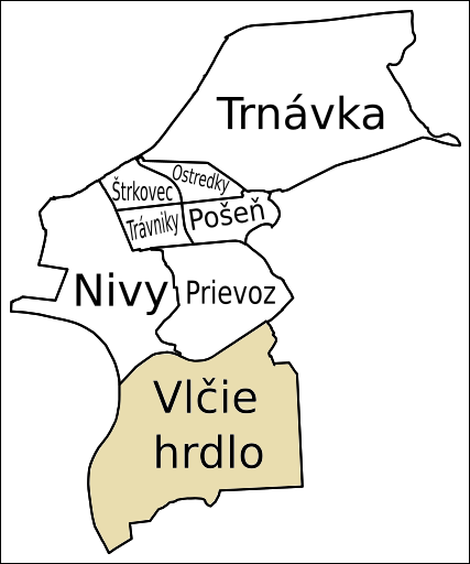 Vlčie hrdlo, Ružinov, Bratislava